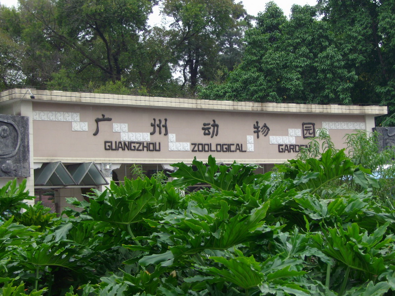 广州动物园